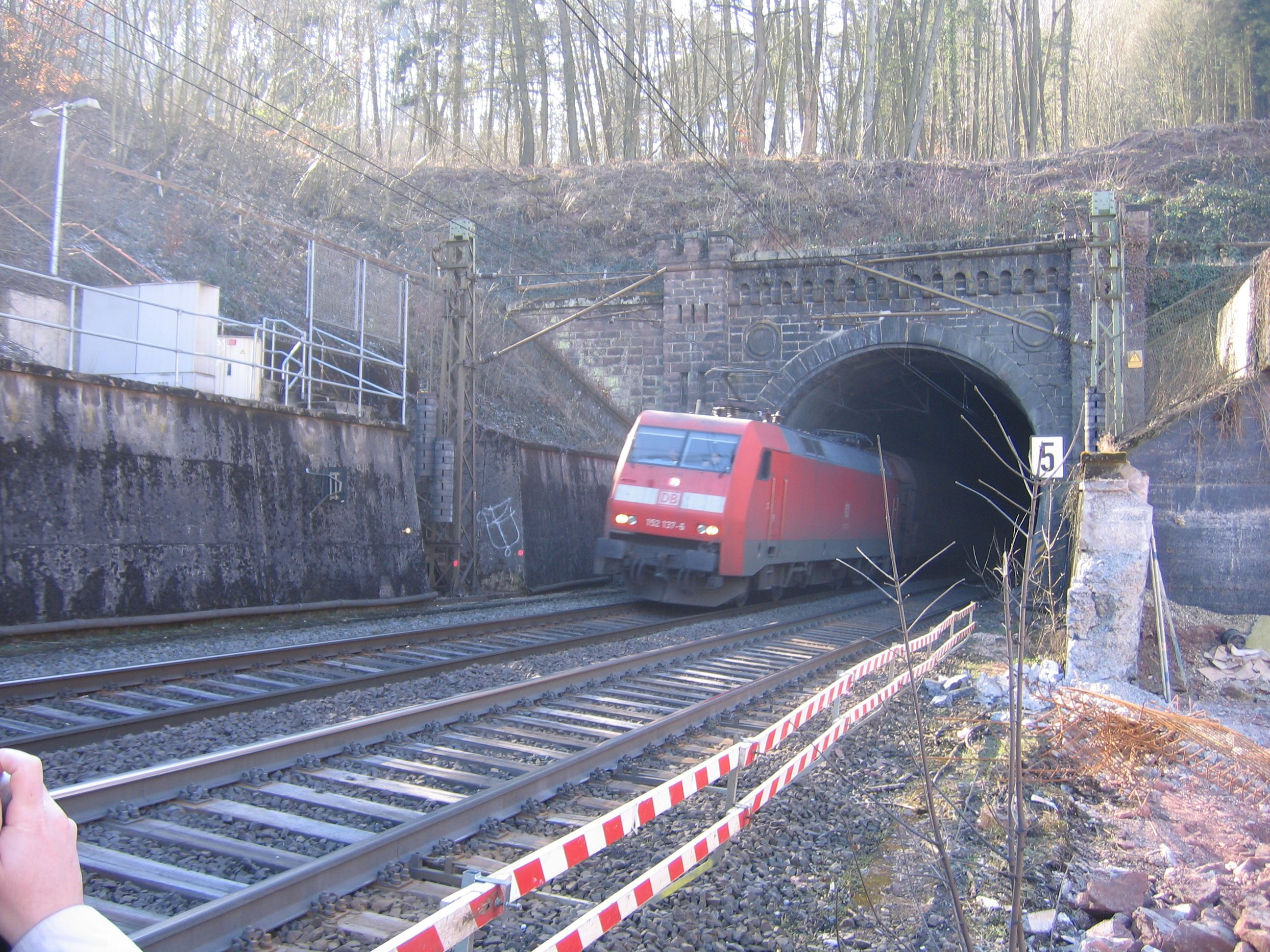 Nordportal Ramholztunnel